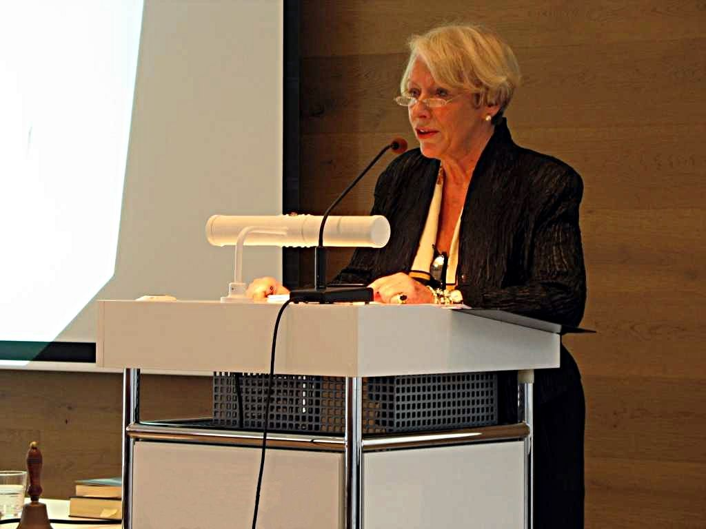 Prof. Dr. Sabine Wienker-Piepho am Vortragspult